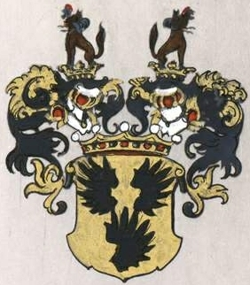 Diebitschi suguvõsa vabahärravapp